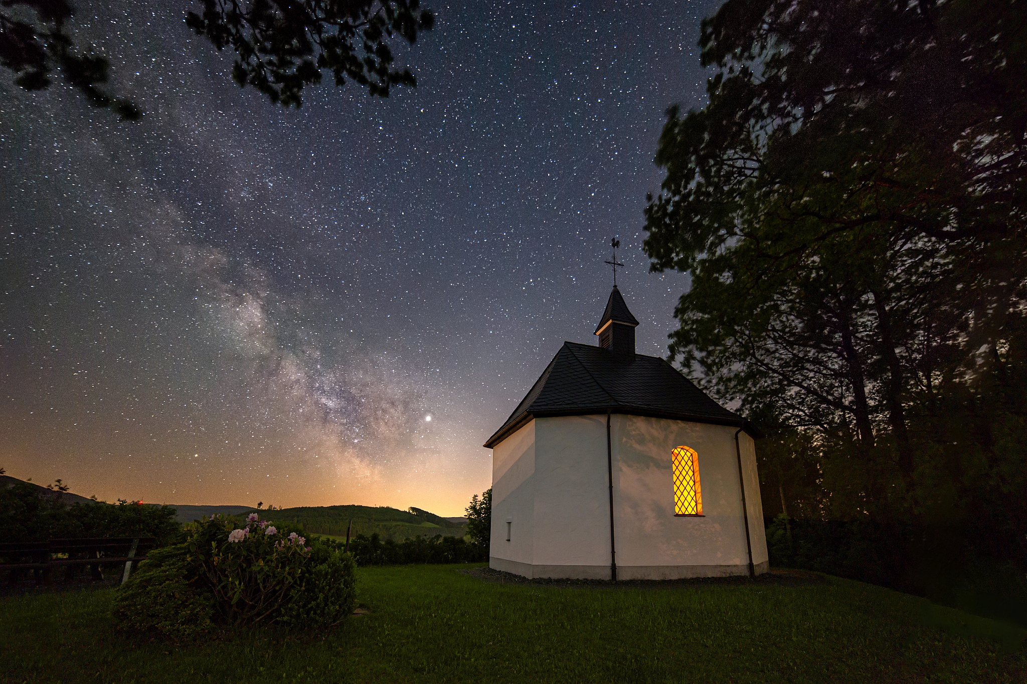 Kapelle auf dem Steimel über dem Ortsteil Kirchrarbach der Stadt Schmallenberg